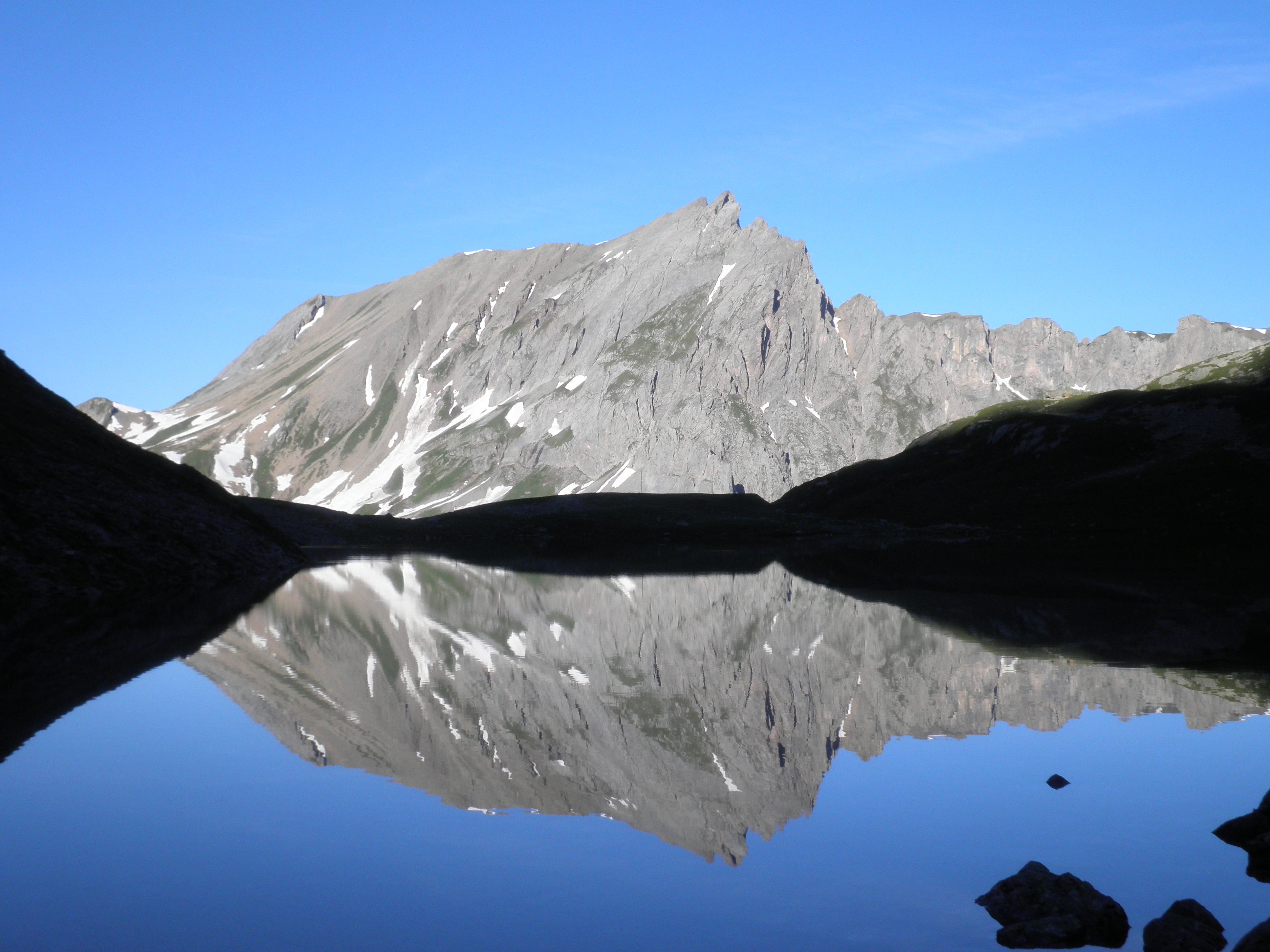 L'aiguille de la Penaz se reflète dans le lac inférieur des Jovets.